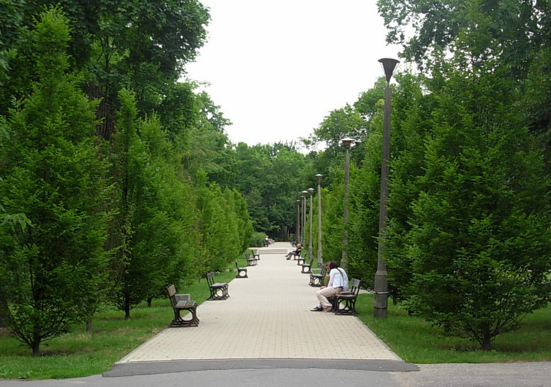 Park Ludowy im. Wincentego Witosa w Bydgoszczy